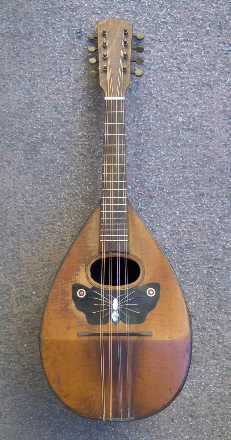 neapolitan mandolin, front view